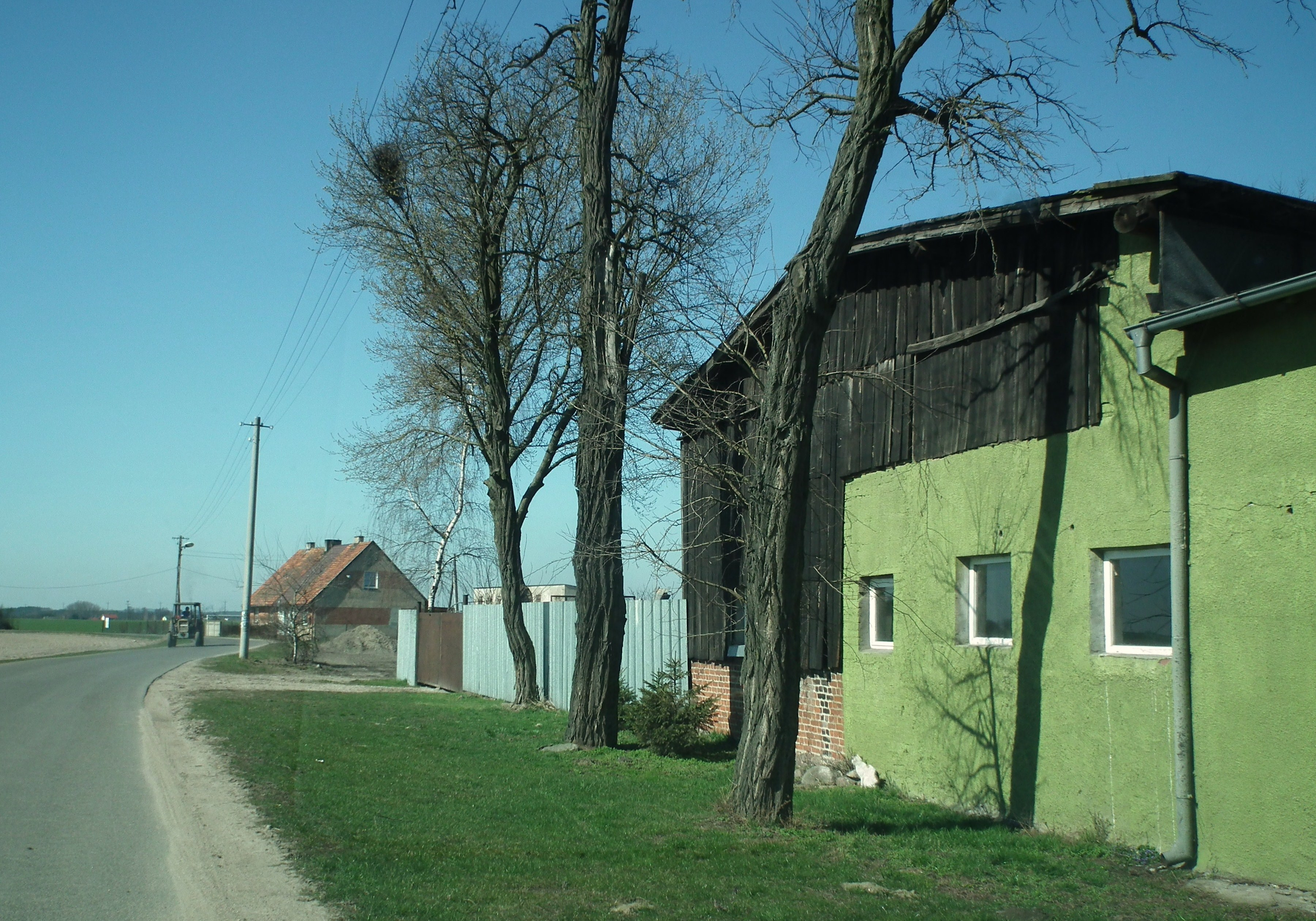 Góra - wieś w gm. Pobiedziska.